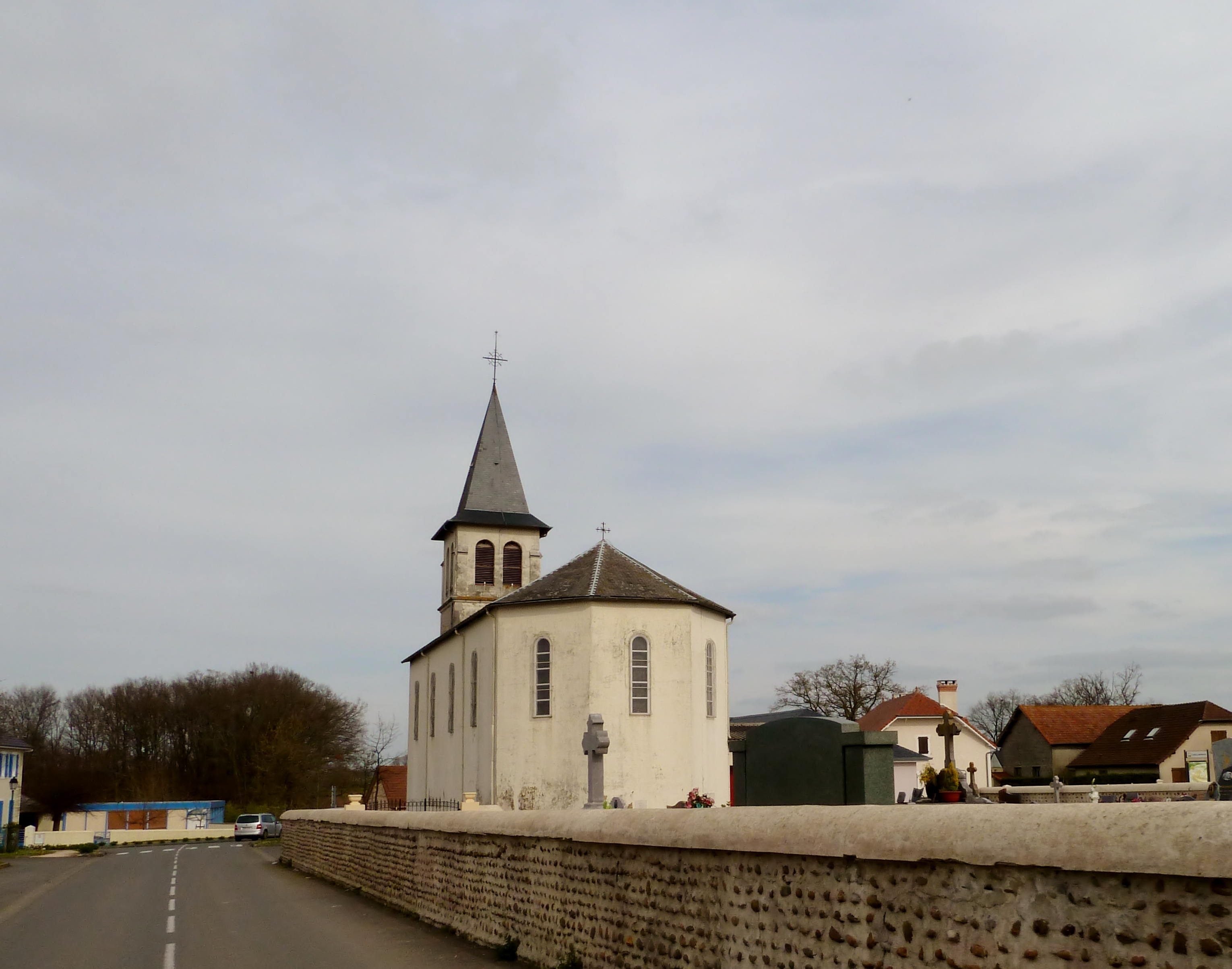 Église de Lasclaveries